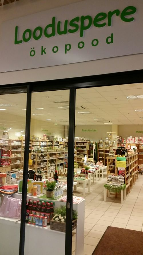 Looduspere pood, Peetri